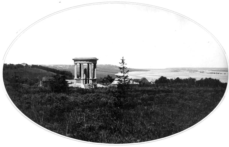 Памятник-беседка в честь 100-летия со дня рождения И.А. Гончарова